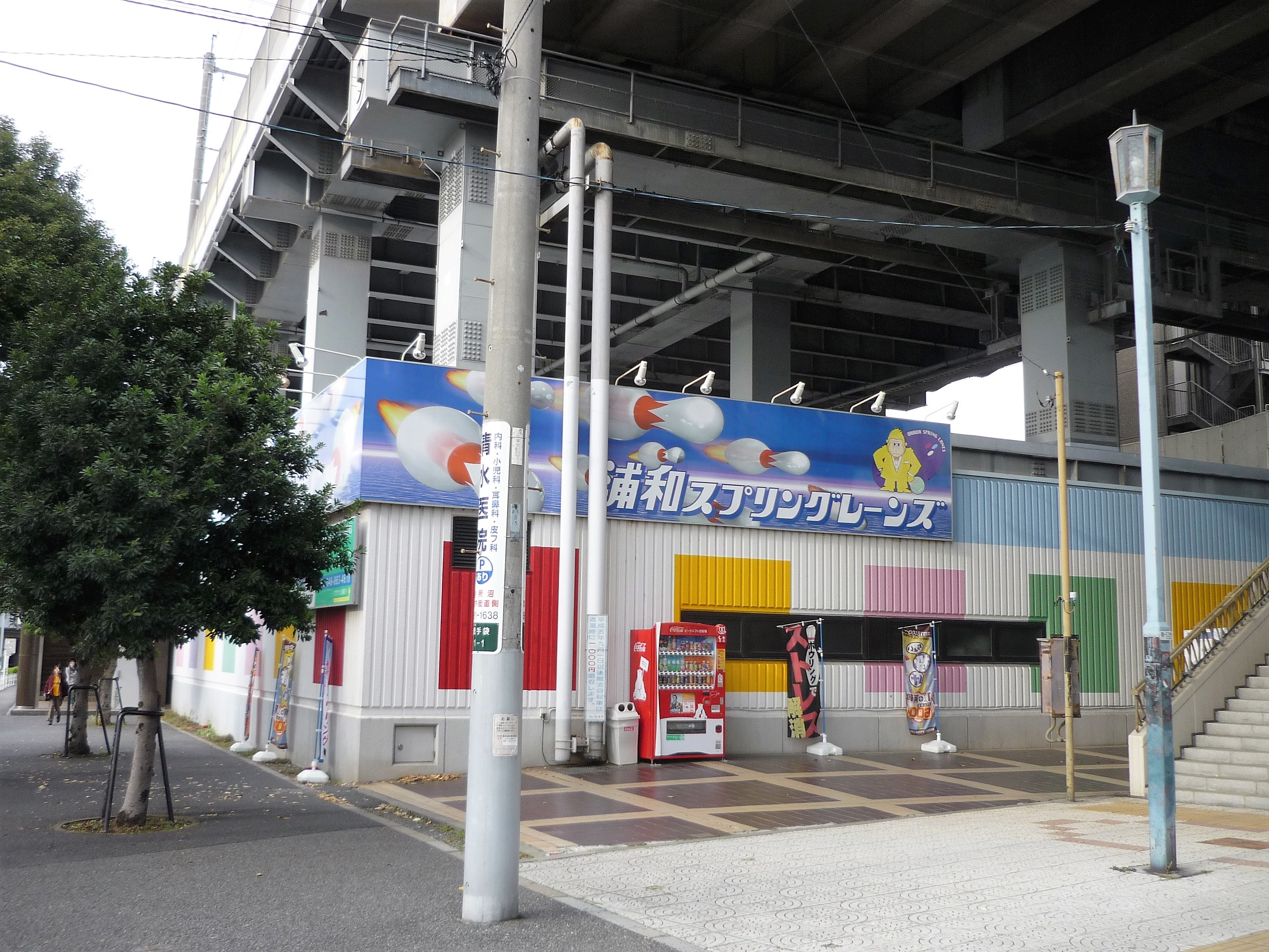 浦和スプリングレーンズ Panasonic Lumix DMC-FS3